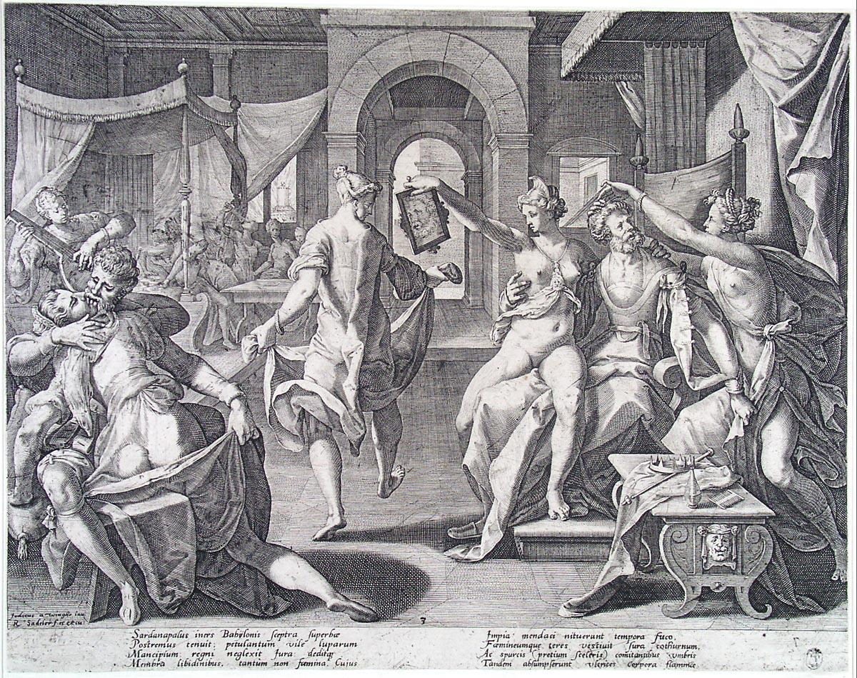 Sardanapal en zijn vrouwen Gravure van Rafael Sadeler naar Joos van Winghe Prentenkabinet Museum Boijmans Van Beuningen